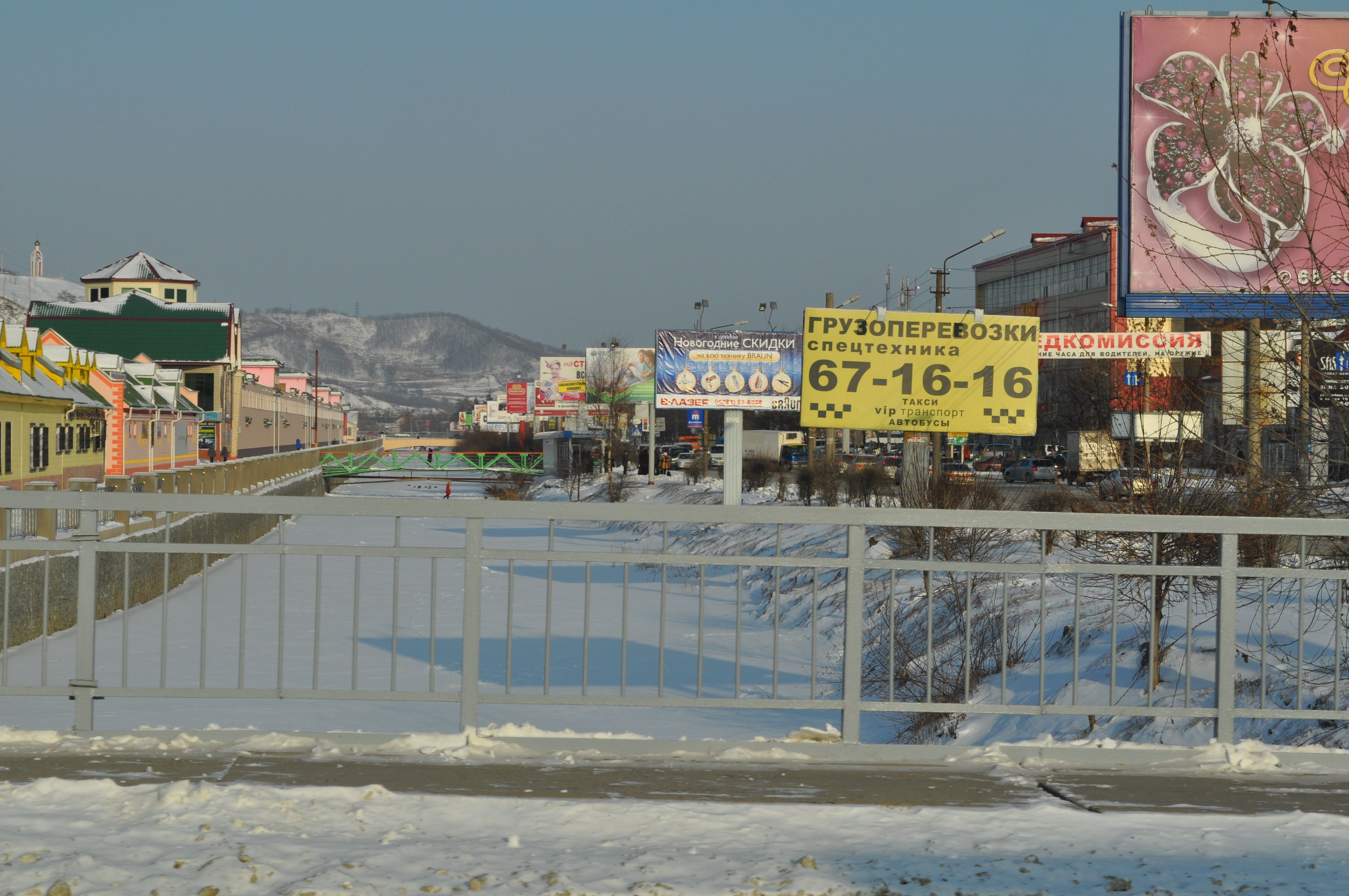 Kamenka River in Nakhodka